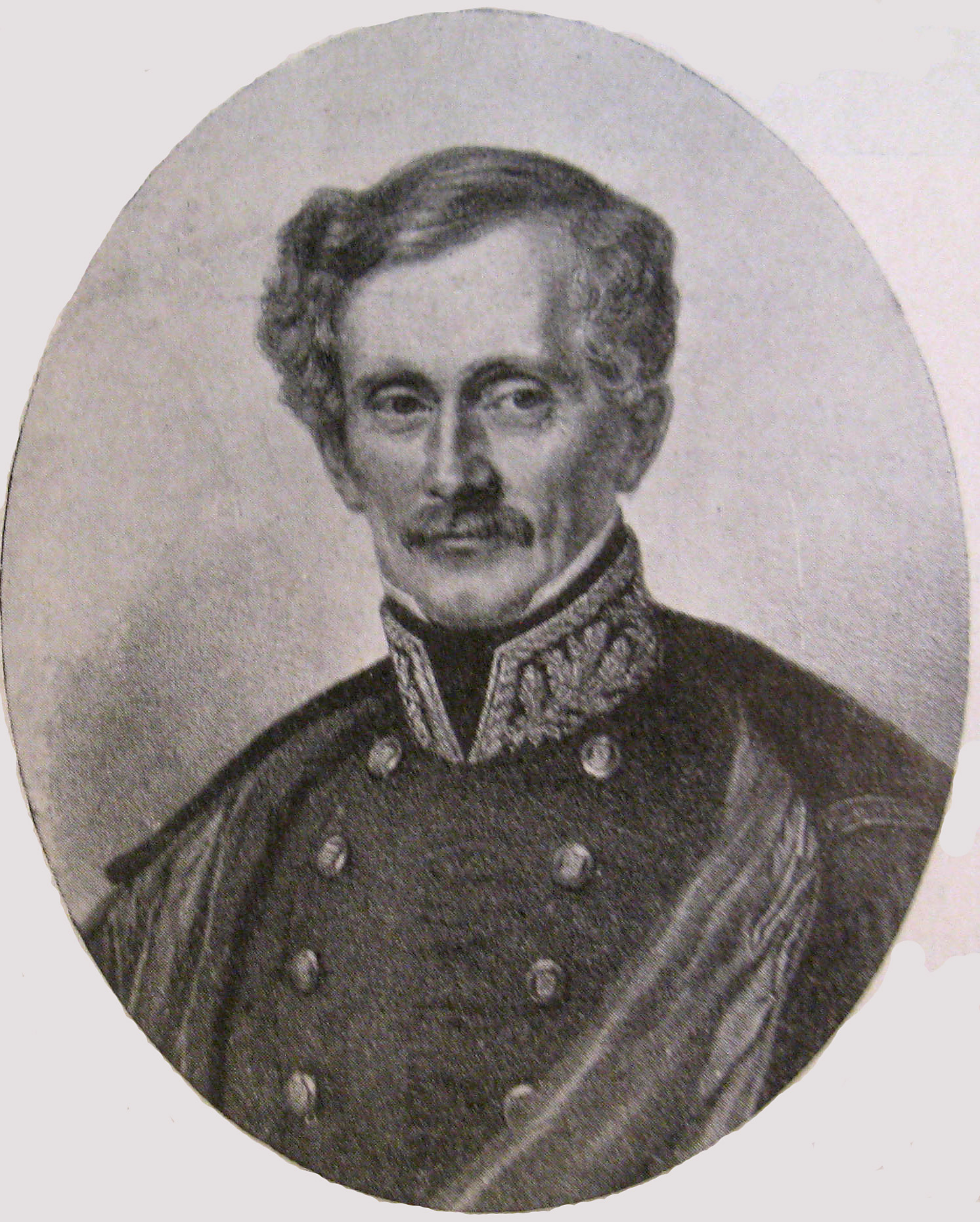 Lensbaron Hans Henrik Rosenkrantz (1806 - 1879), Kammerherre hofjægermester Ridder af Dannebrog